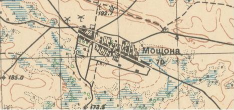 Карта с.Мощена 1920р.